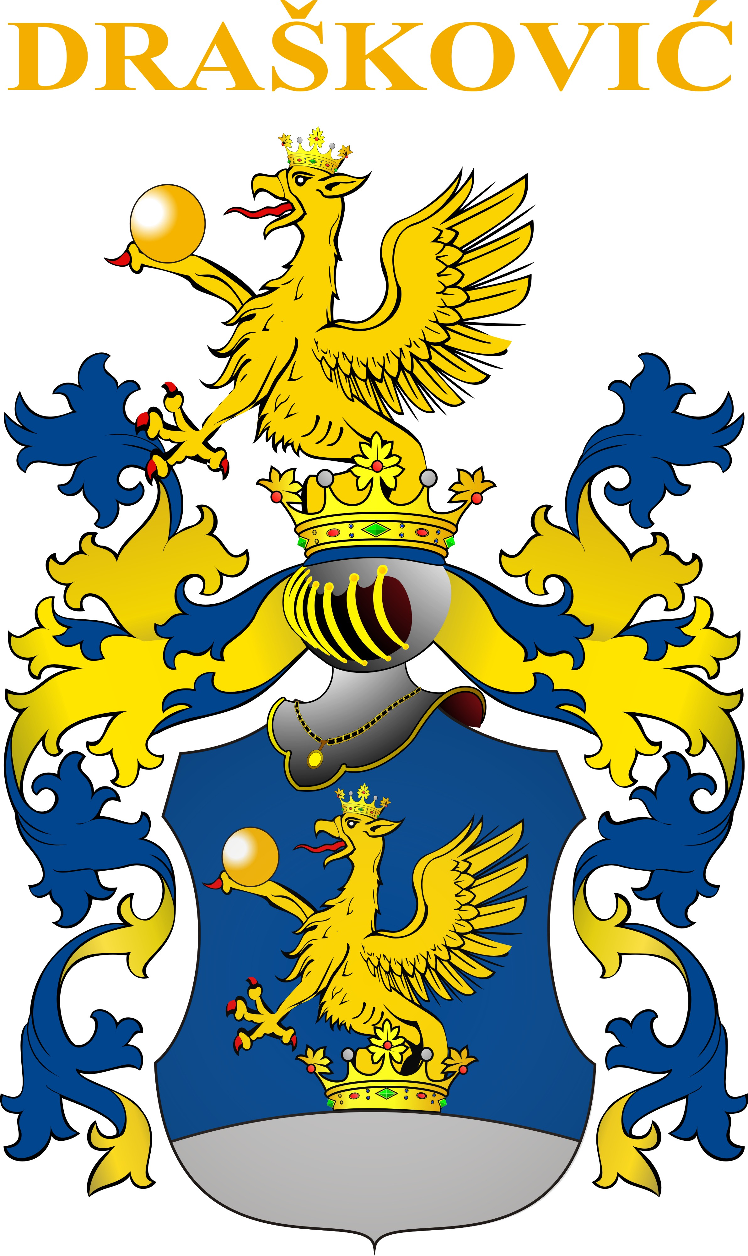 Grb roda Drašković